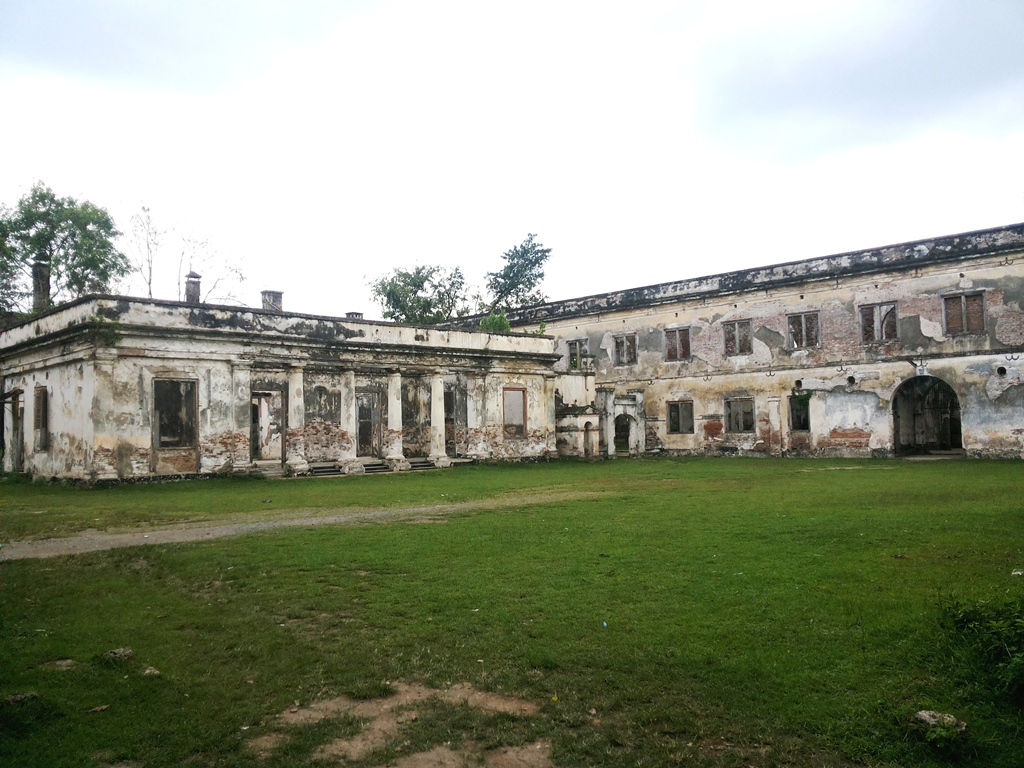 La cour intérieure du fort Van den Bosch à Ngawi, Java oriental, Indonésie